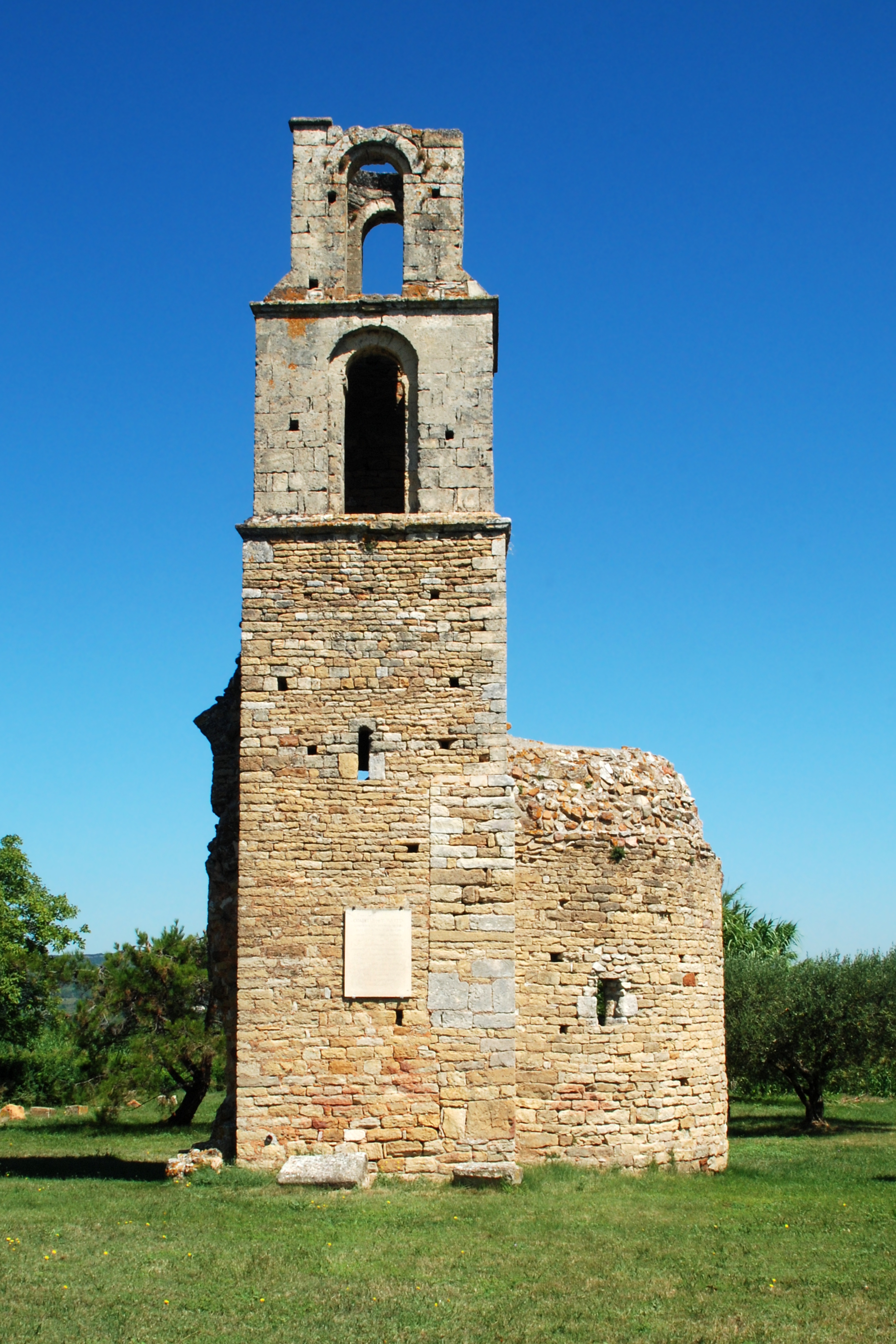 France - Gard - Chapelle Saint-Martin de Saint-Victor-la-Coste .